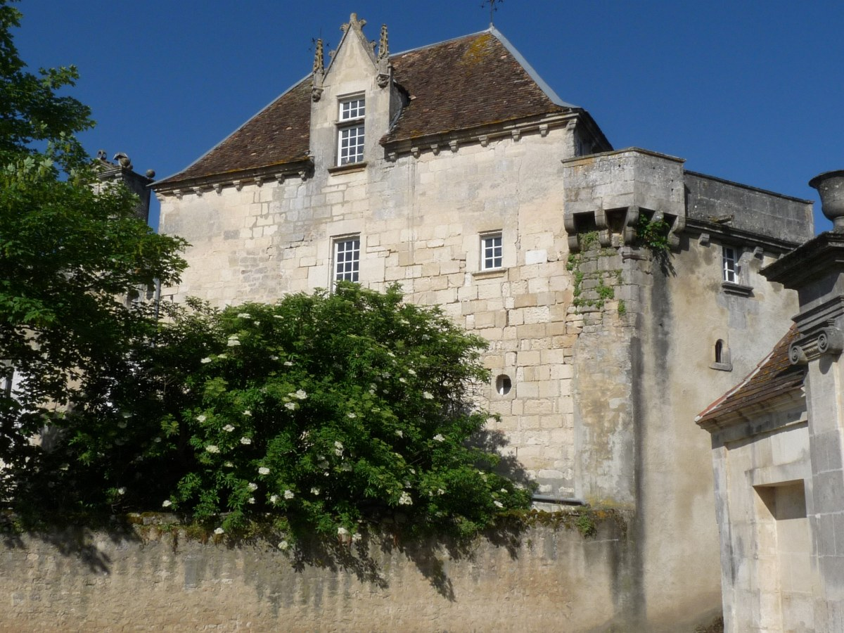 Château de Villars-Marange, Villars, Mérignac, Charente, France